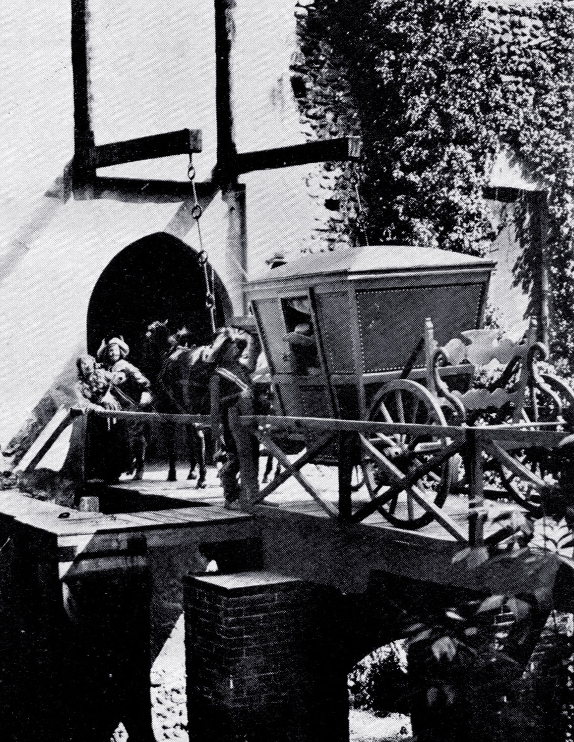 I promessi sposi 1913- versione edita dalla "Ambrosio", regia di E. Rodolfi - foto scena